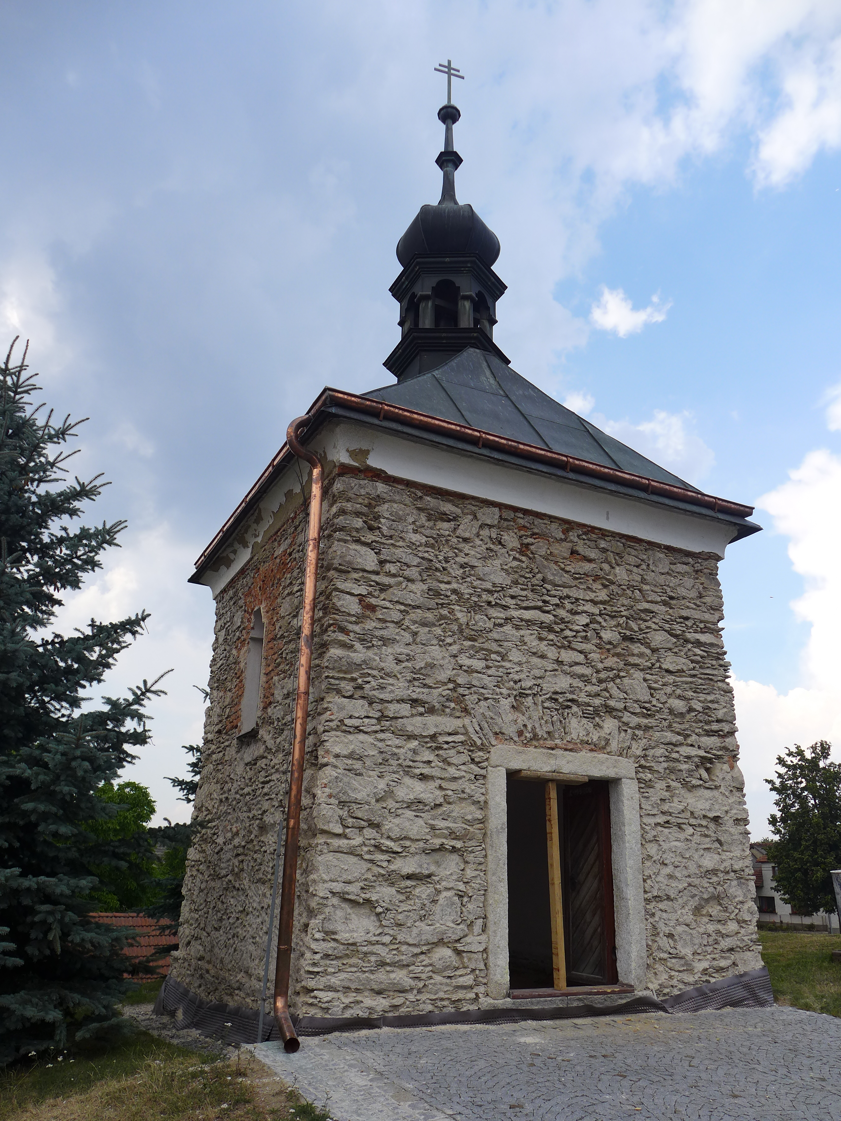 Kaplička svatého Jana Nepomuckého, Stáj, Stáj (okres Jihlava).